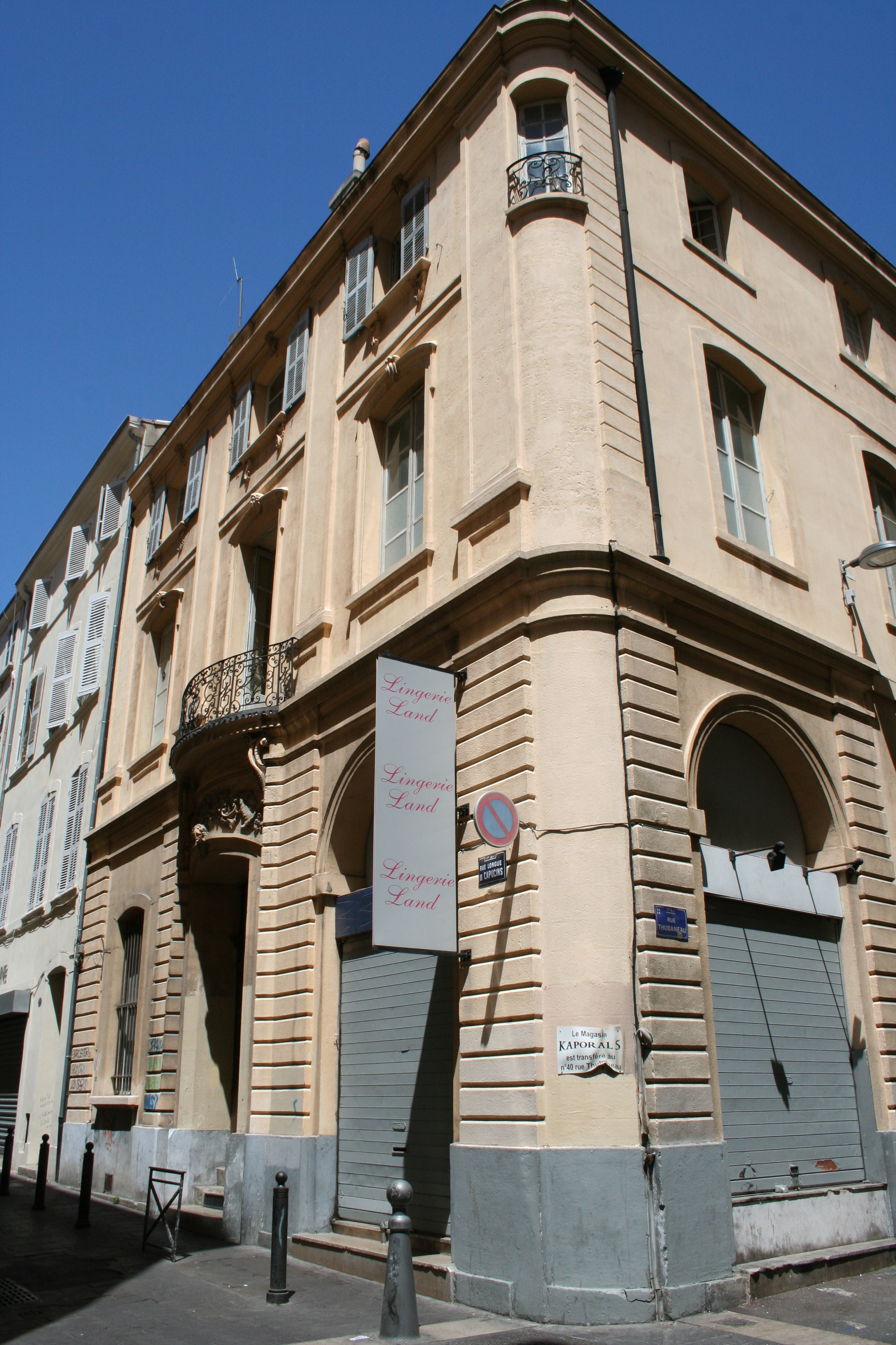 Hôtel Hubaud situé au N° 38 de la rue longue des capucins à Marseille, bâtiment inscrit monument historique.